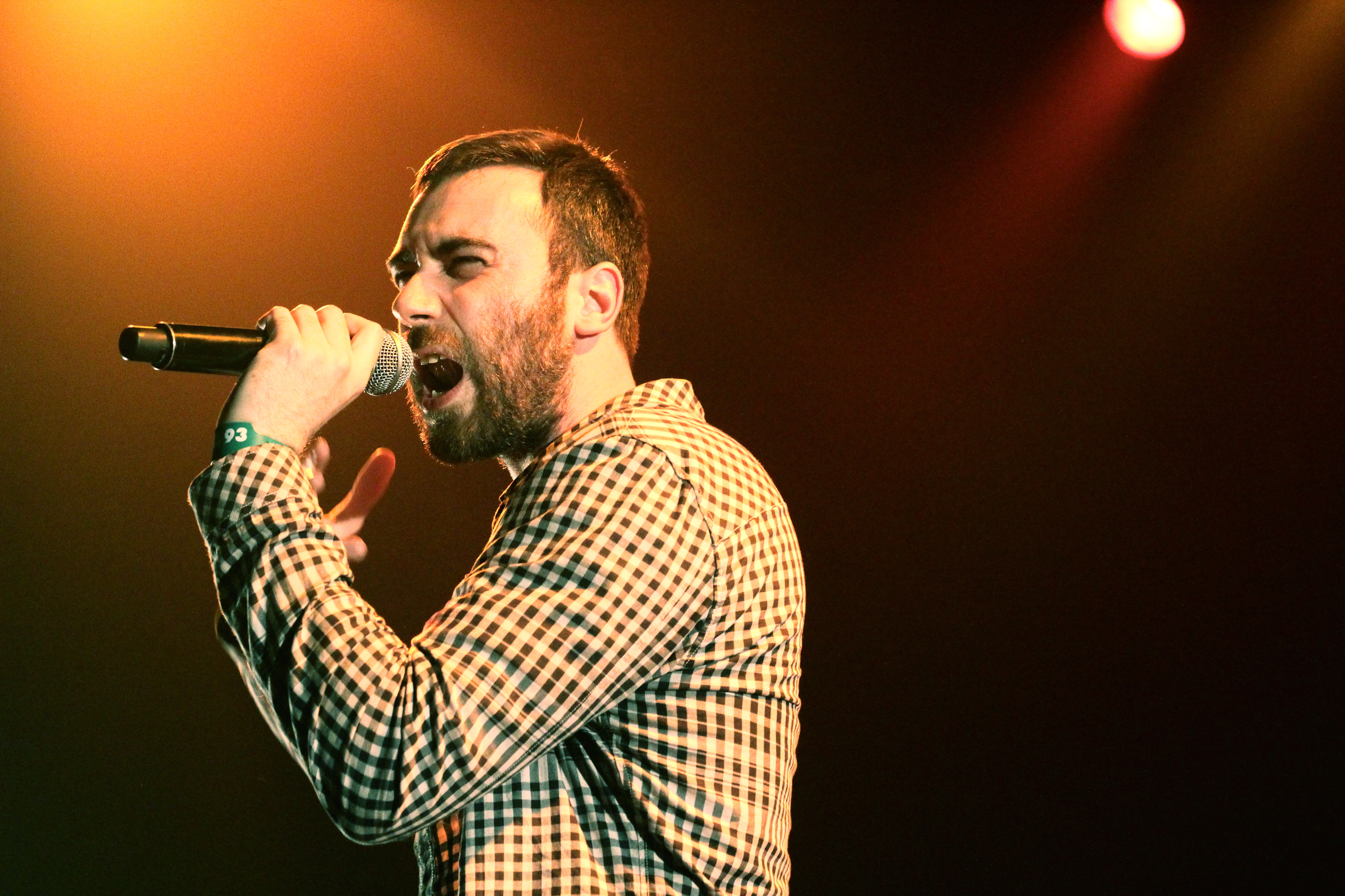 Terre(s) Hip Hop 2014, Canal 93, Le 14 mars 2014, Bobigny